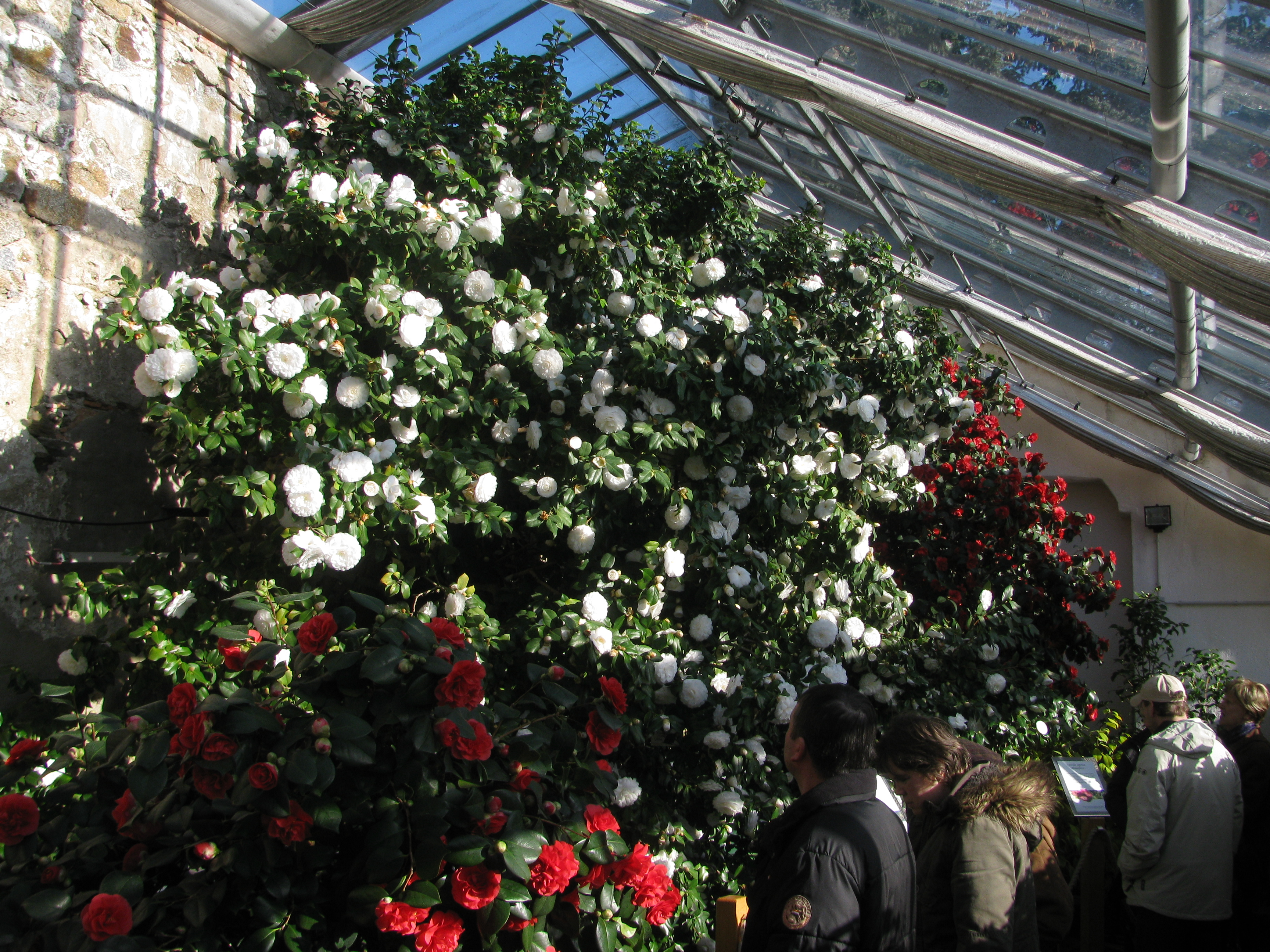 Camellias in Königsbrück, Saxony